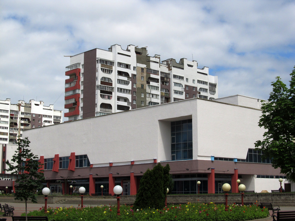 Салігорск. Забудова вуліцы Леніна